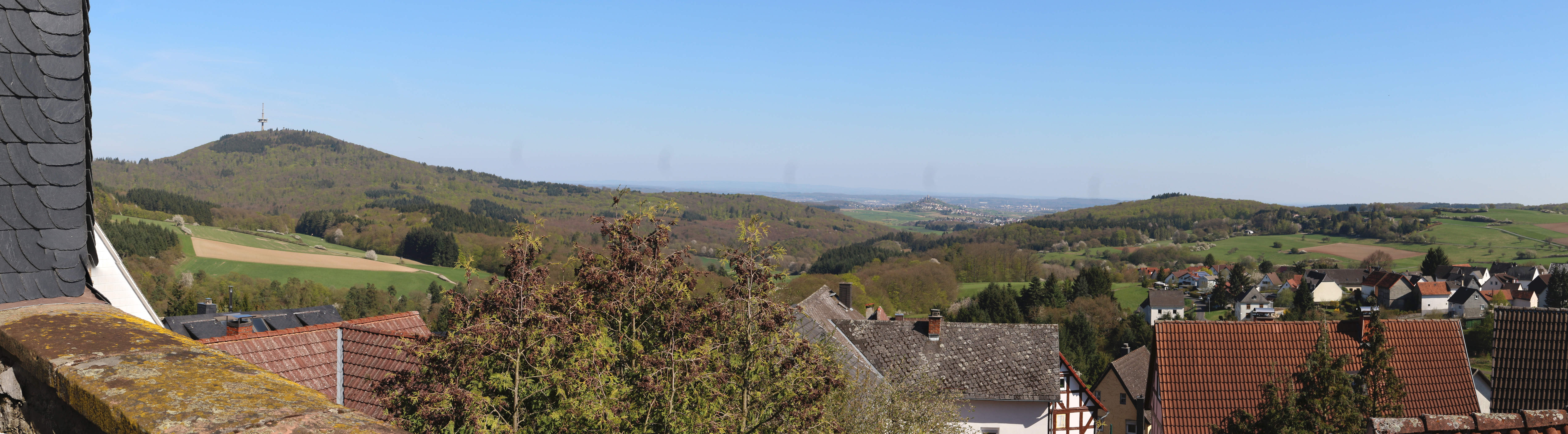 Blick vom Hof der Ev. Kirche Königsberg ins Gleiberger Land. Rechts der Mitte um Tal liegen Vetzberg und Gleiberg auf einer Linie und verschmelzen miteinander.